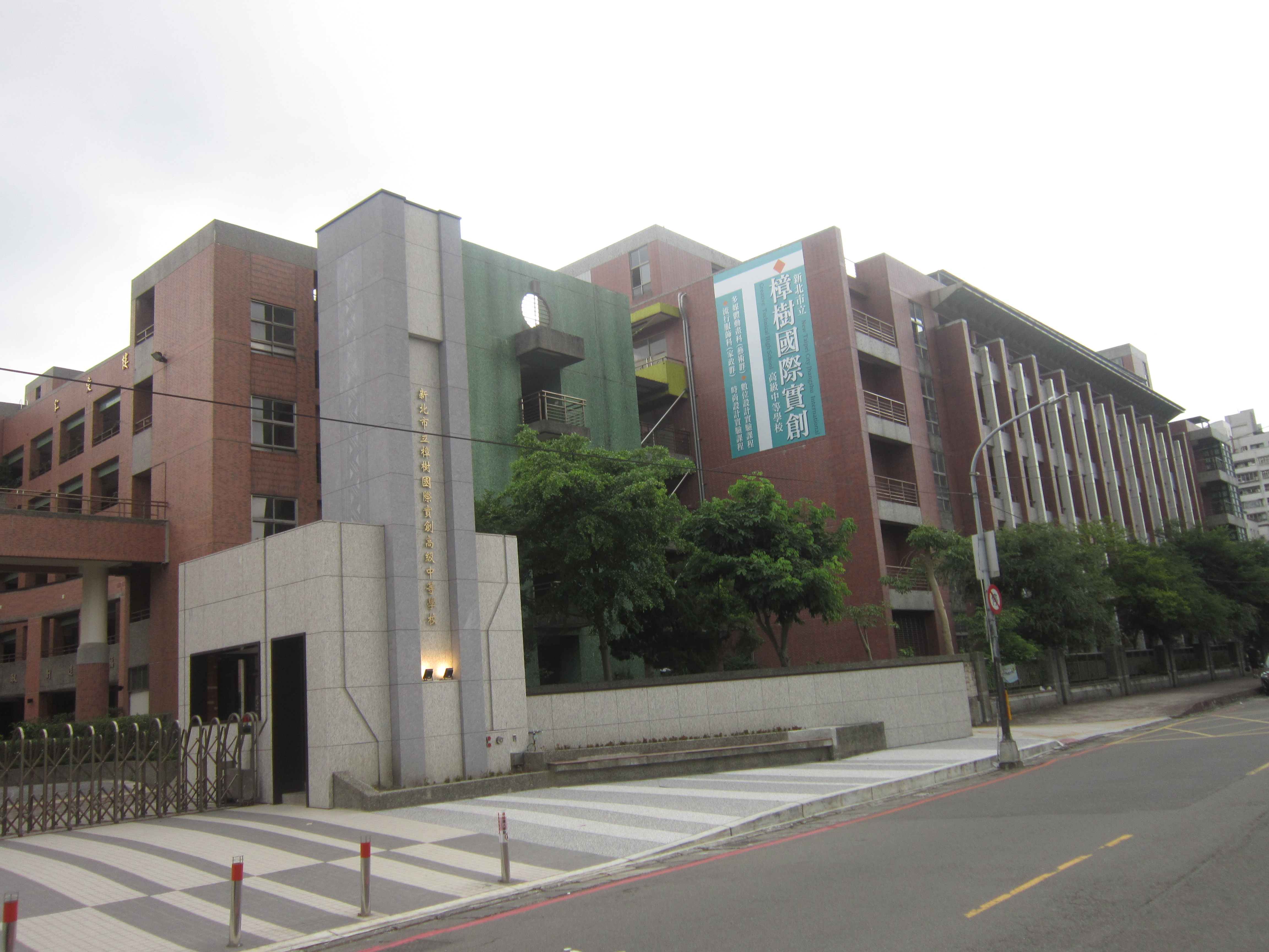 新北市立樟樹國際實創高級中等學校教學大樓一景。